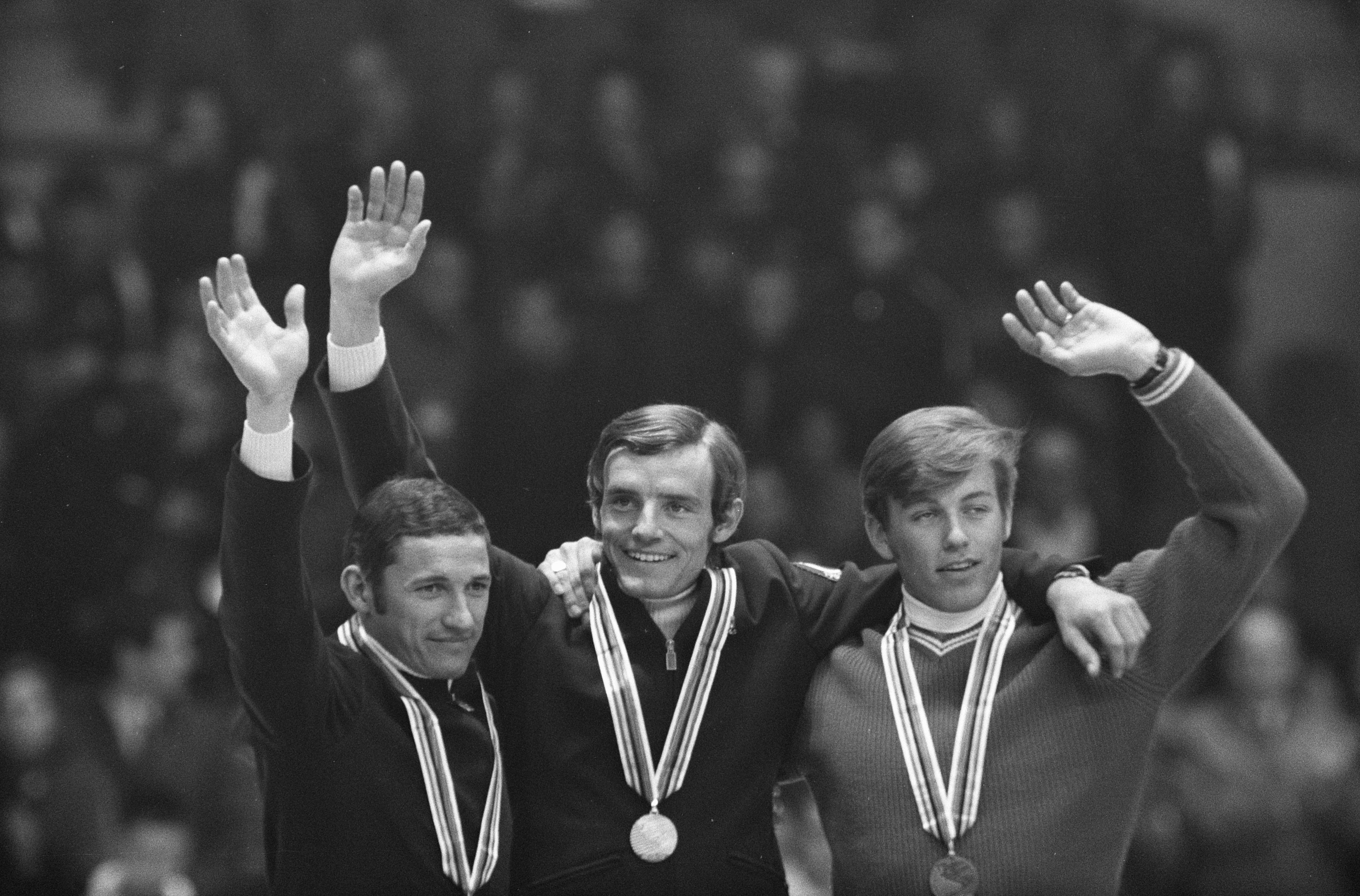 Jeux olympiques 1968 de Grenoble. Photographie de la cérémonie de remise de médailles de l'épreuve de descente en ski alpin par Ron Kroon / Anefo. De gauche à droite : Guy Périllat (France, argent), Jean-Claude Killy (France, or) et Jean-Daniel Dätwyler (Suisse, bronze).